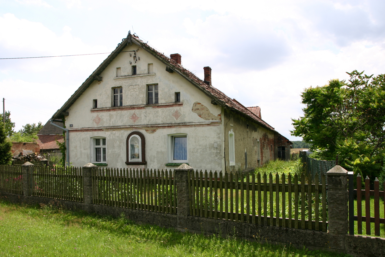 Pogórze (dodatkowa nazwa w j. niem. Pogosch) – wieś w Polsce położona w województwie opolskim, w powiecie prudnickim, w gminie Biała.